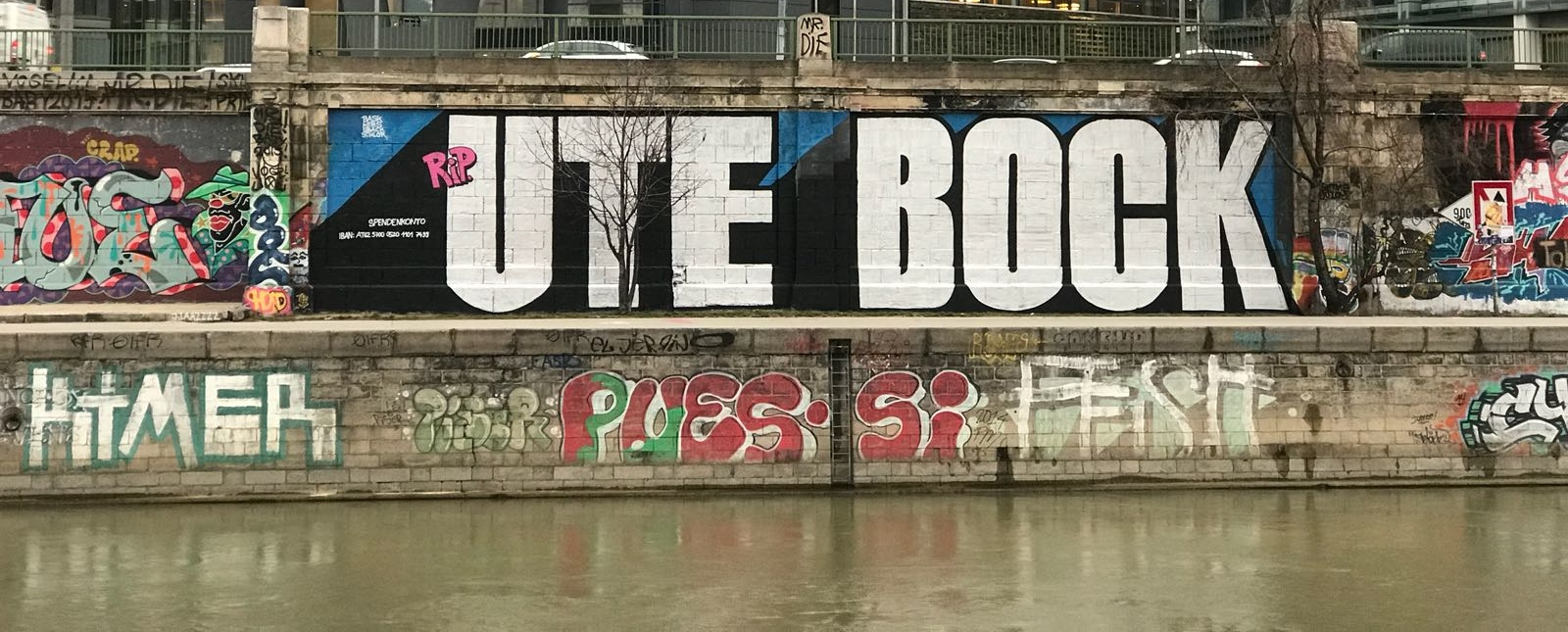 Griffiti für Ute Bock am Wiener Donaukanal